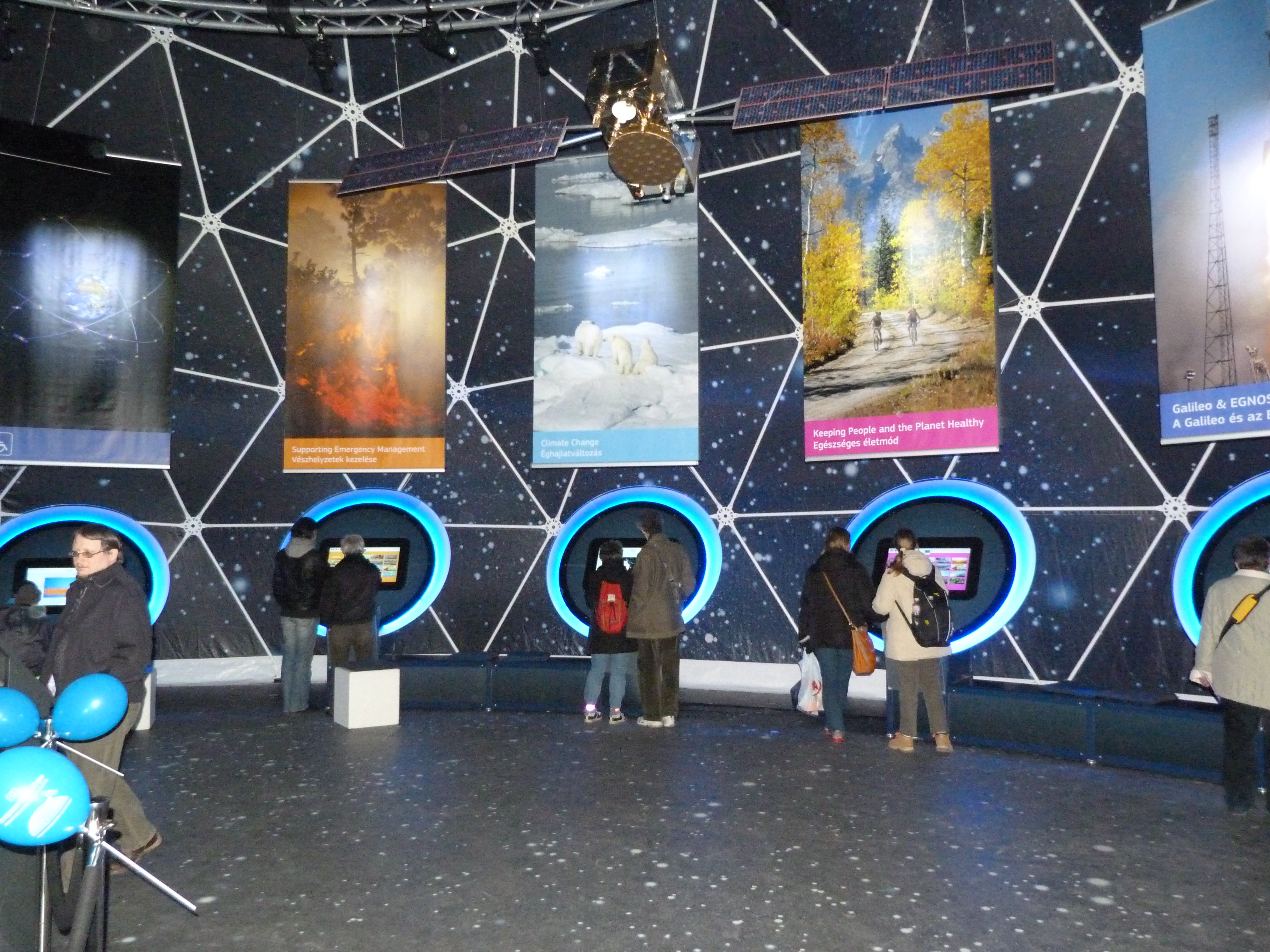 Live on the 22th of March, 2013. European Space Expo. Erzsébet tér, Downtown Budapest. Travelling exhibiton 20 - 25 March 2013. Europe is strengthening its capacity for sea monitoring, border surveillance, space exploration and providing all EU countries with access to space. Along with Galileo (global satellite navigation system) and Copernicus (global monitoring for environment and security system). Sources